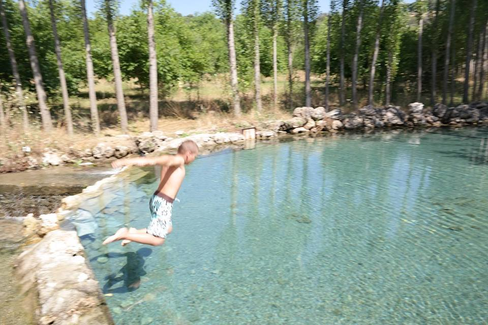 Yüzme